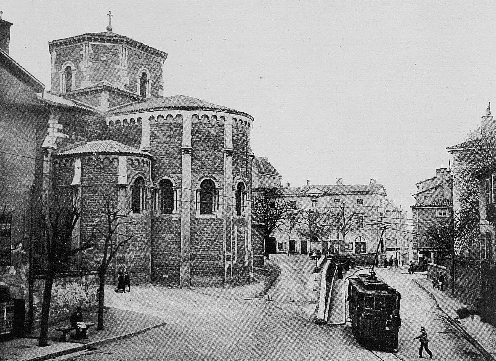 Dictionnaire illustré des communes du département du Rhône. Tome 1 / par MM. E. de Rolland et D. Clouzet.